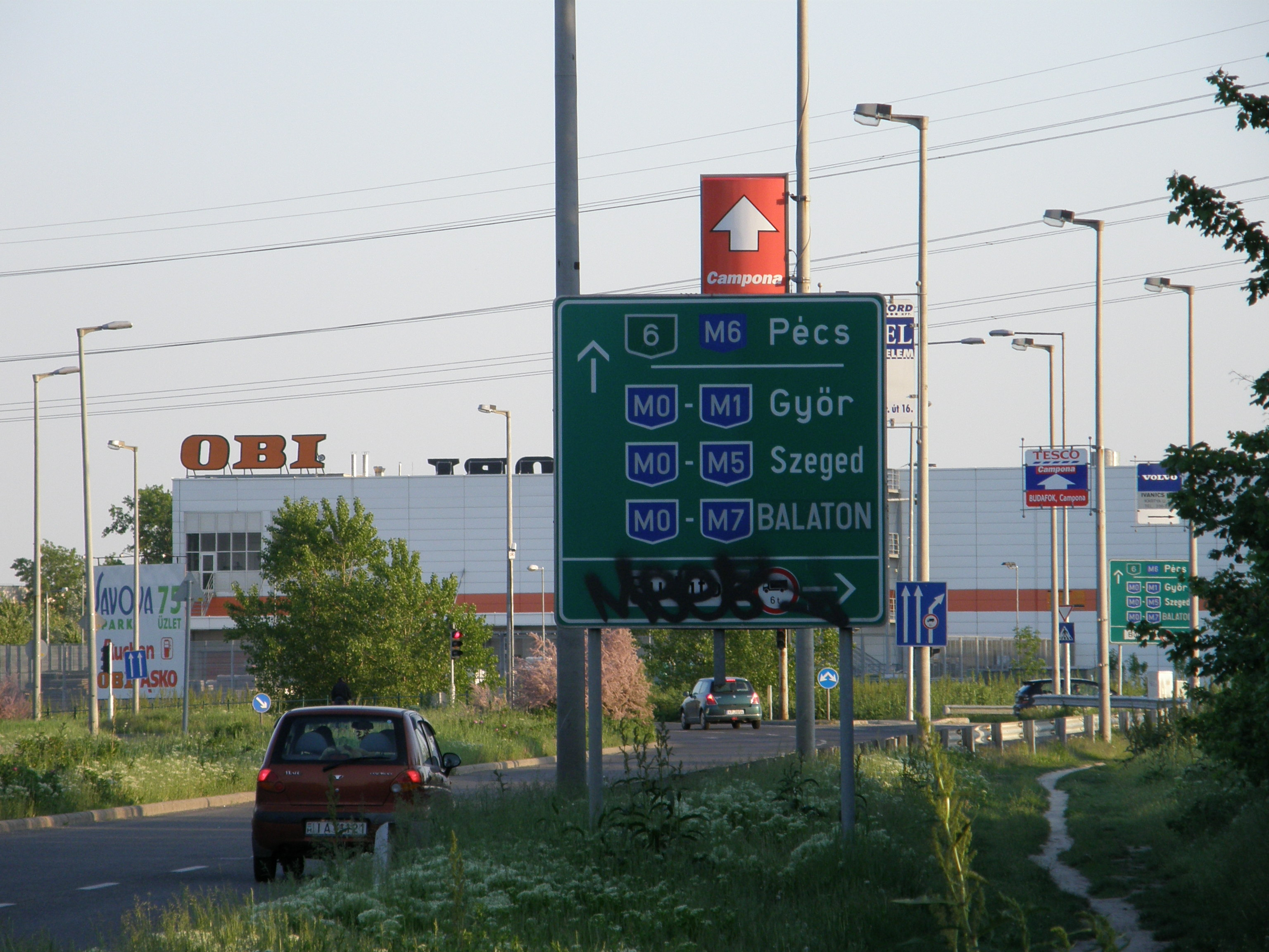 Road 6 - Hungary